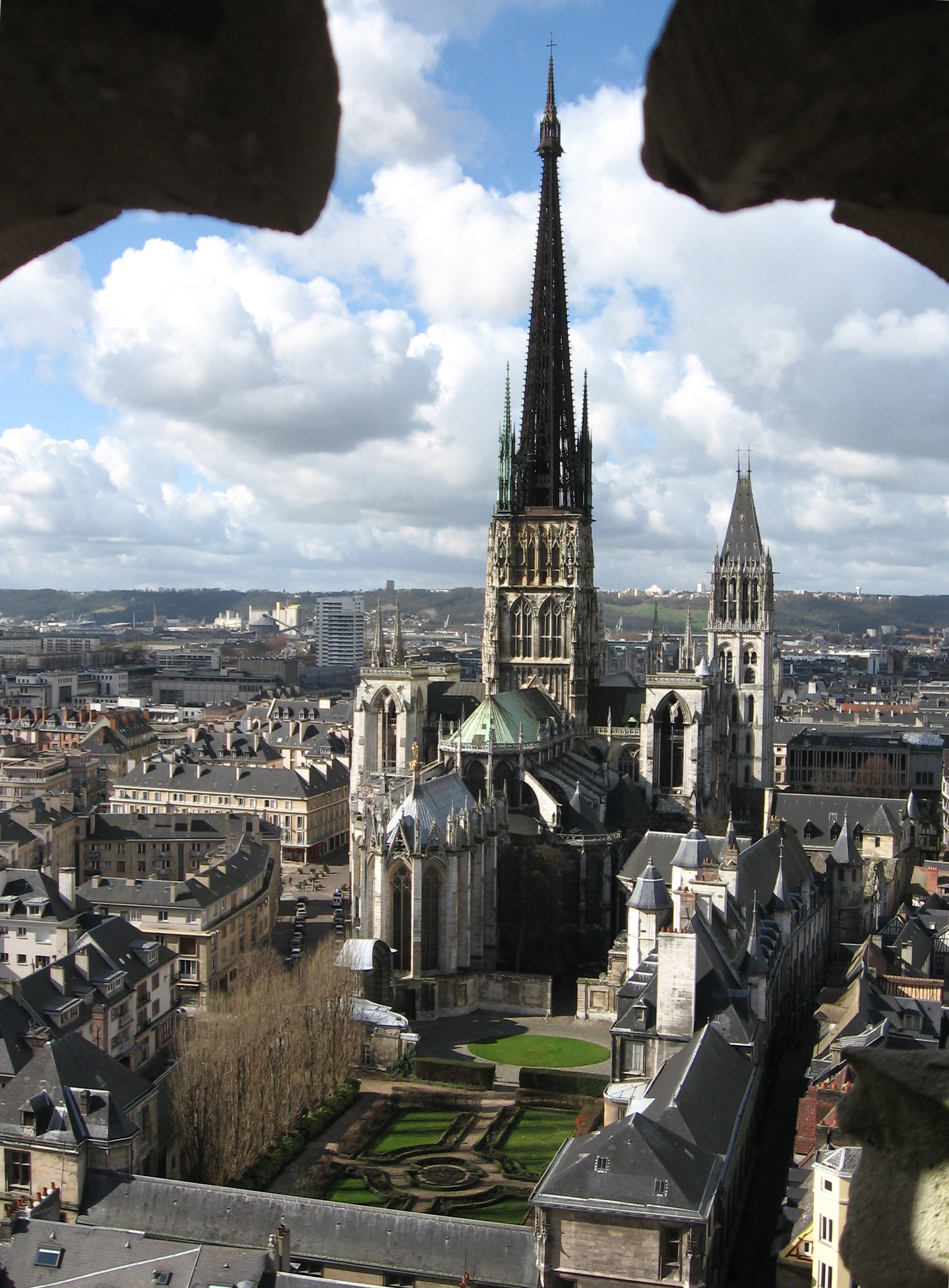 Rouen Cathédrale Notre-dame vue du clocher de l'église Saint Maclou .